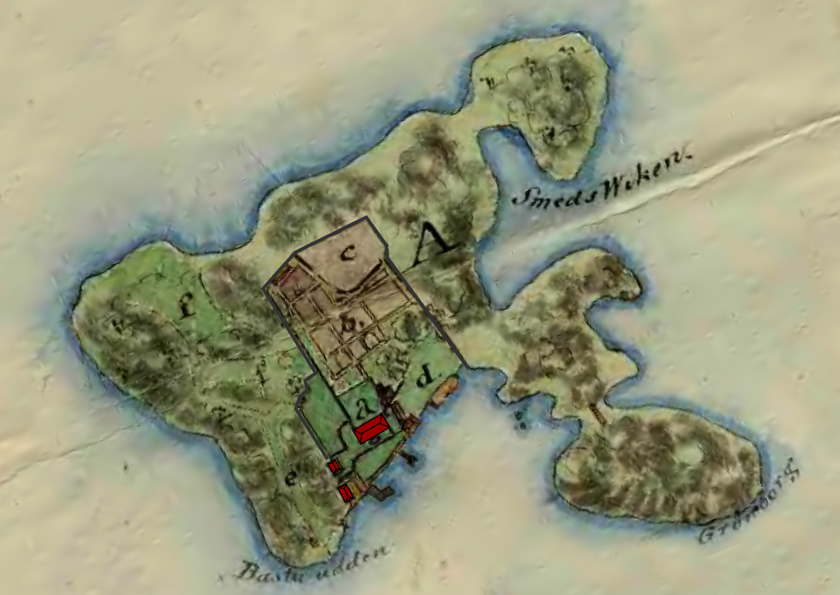 Karta över Stora Fjäderholmen, Lidingö socken, 1811. Kartan visar var Fjäderholmens värdshus var beläget på den södra sidan av ön och de trädgårdodlingar som tillhörde värdshuset. Den vik som idag kallas Krogviken benämdes 1811 som Smedsviken och den sydligaste udden, Bastu udden.